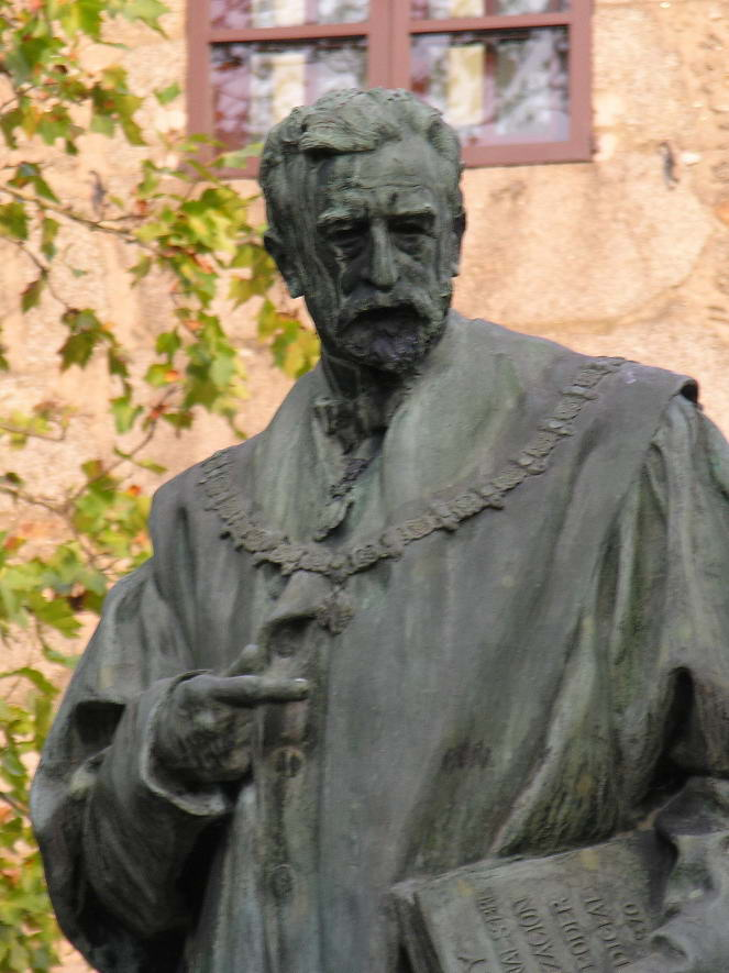 E.Montero Ríos. Estatua exterior na praza de Mazarelos, Zona vella de Santiago de Compostela.